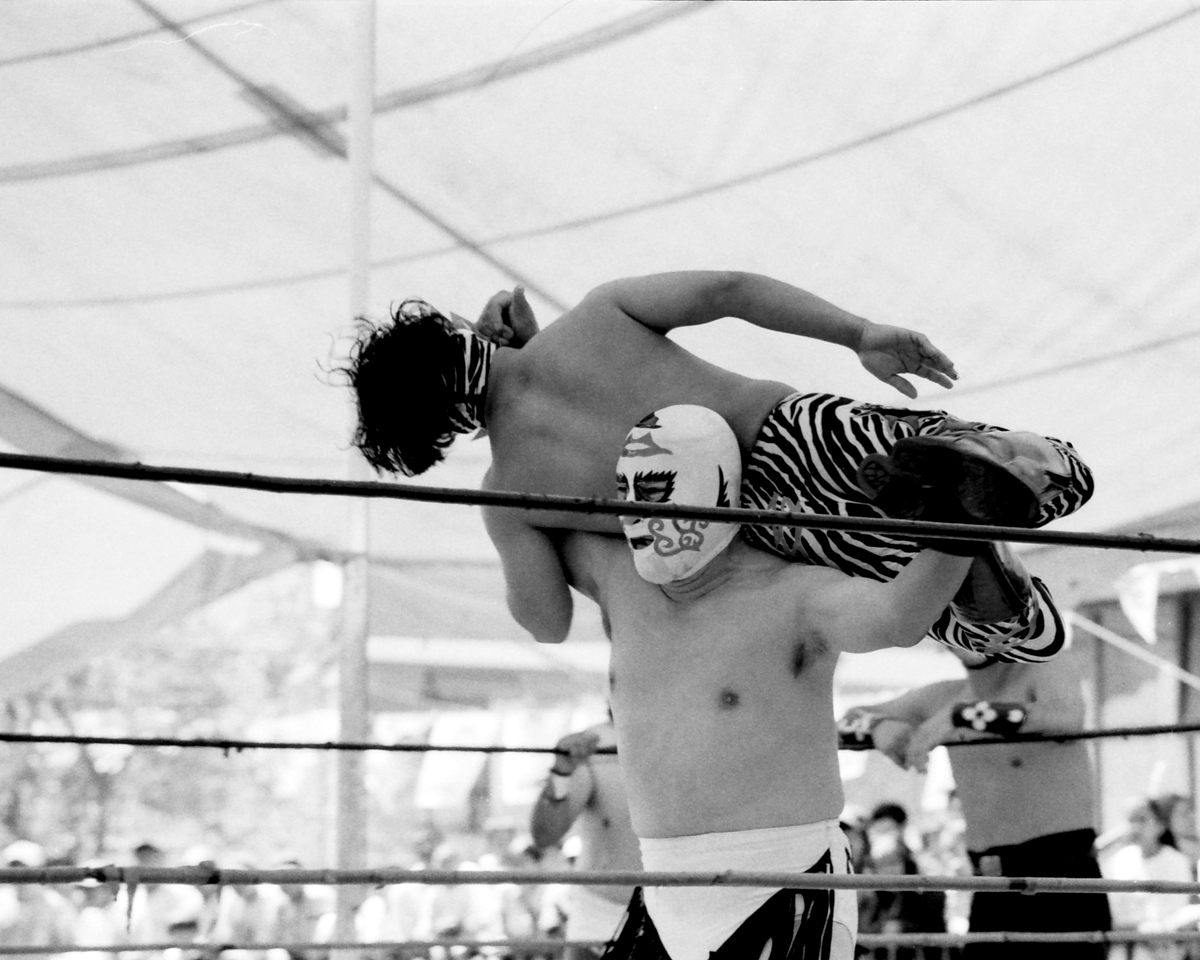 Tlahuac, Ciudad de México